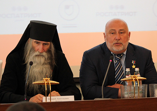 В рамках месячника «Армия против наркотиков!» курсанты филиала Военного учебно-научного центра Военно-воздушных сил «Военно-воздушная академия» в Челябинске встретились с четырьмя Героями Российской Федерации и Героем Советского Союза.